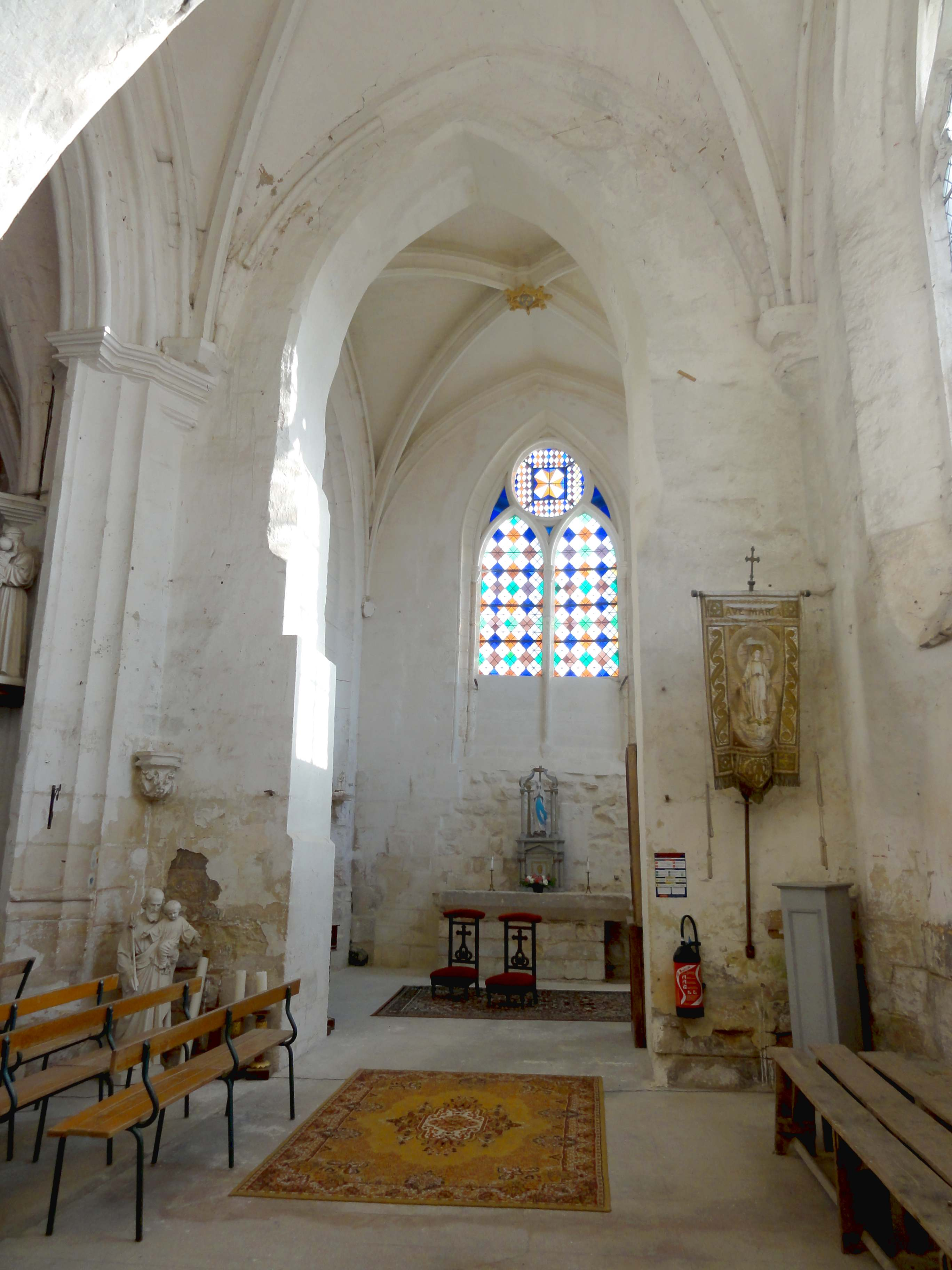 Intérieur de l'église - voir titre.